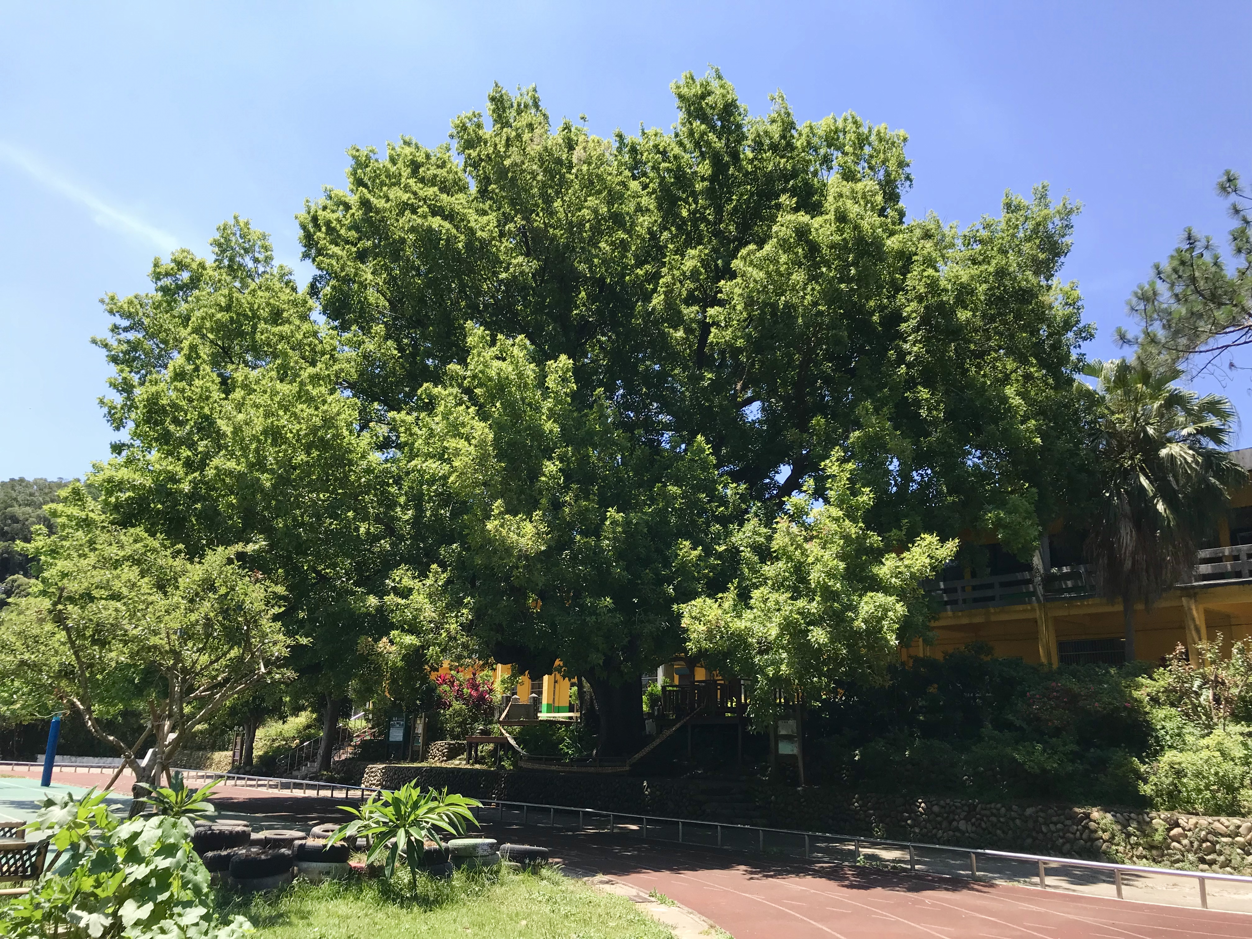 中文（台灣）: 文山國小楓樹伯公